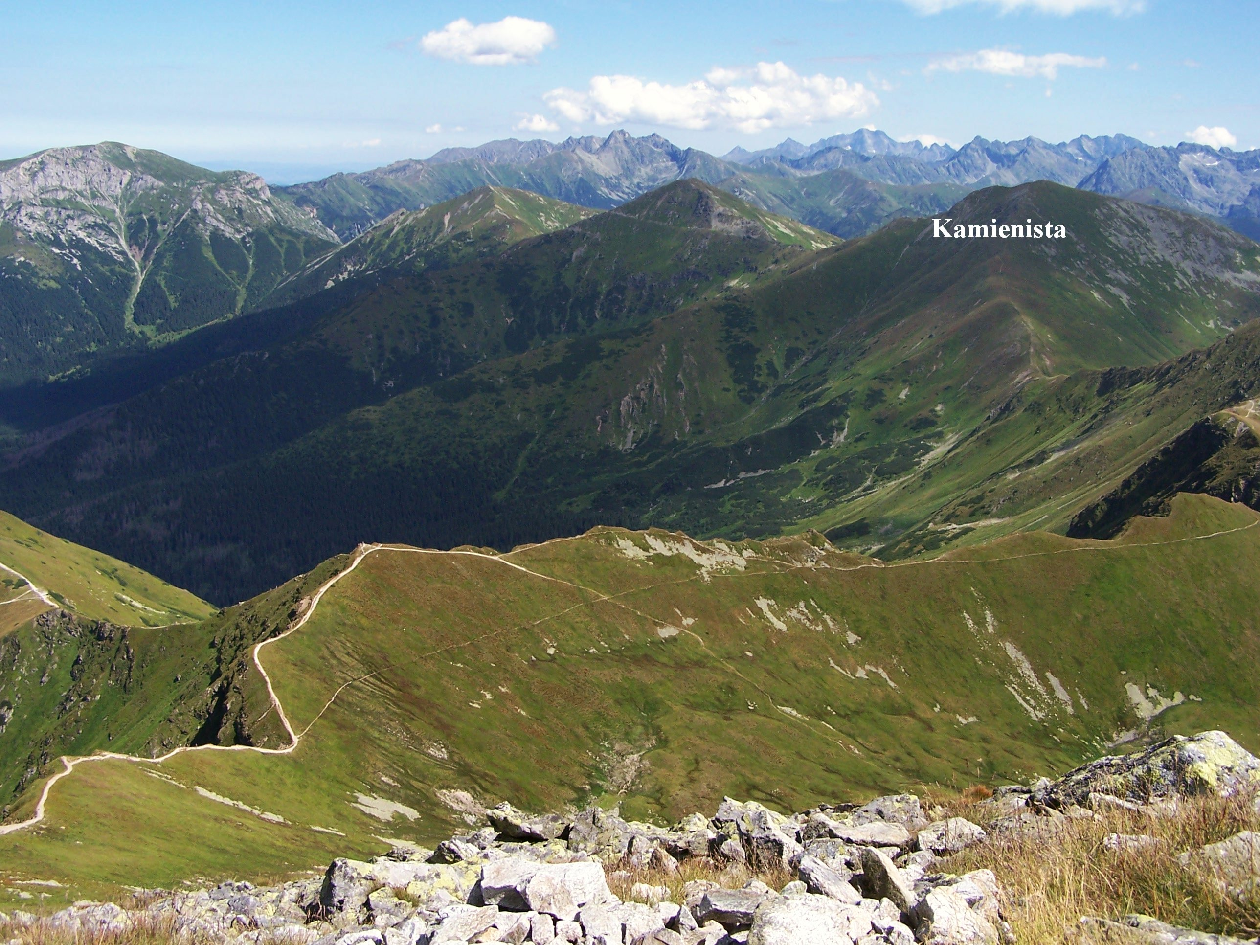 Widok ze Starorobociańskiego Wierchu. Od lewej: Ciemniak, Tomanowy Wierch, Smreczyński Wierch, Kamienista. W głębi za nimi Tatry Wysokie.